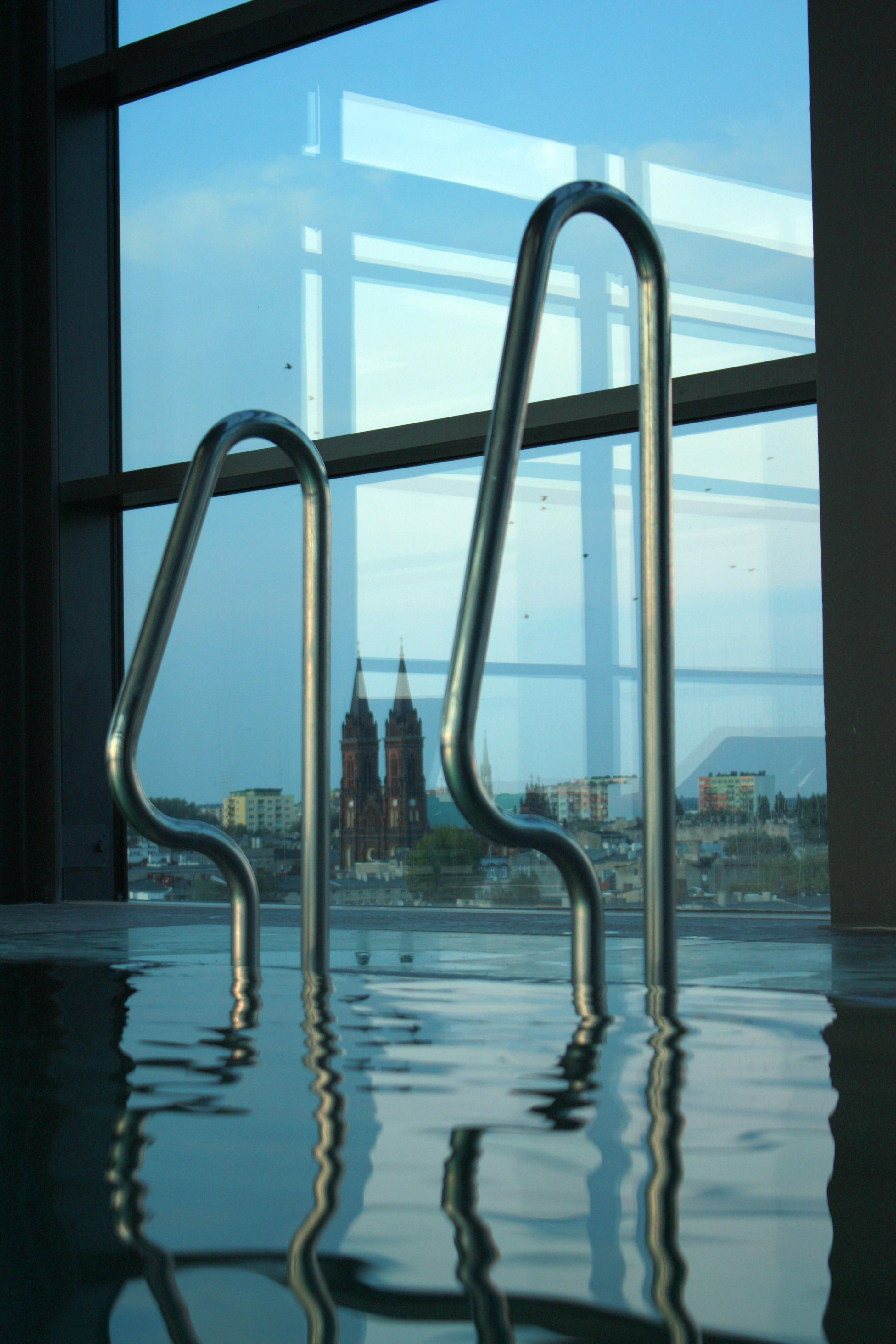 Kościół Wniebowzięcia Najświętszej Maryi Panny w Łodzi